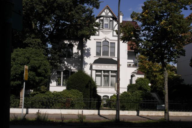 Villa Klatte in Bremen, Hollerallee 32Das abgebildete Objekt ist ein geschütztes Kulturdenkmal in der Freien Hansestadt Bremen, mit der Nr. 0613 beim Landesamt für Denkmalpflege registriert.